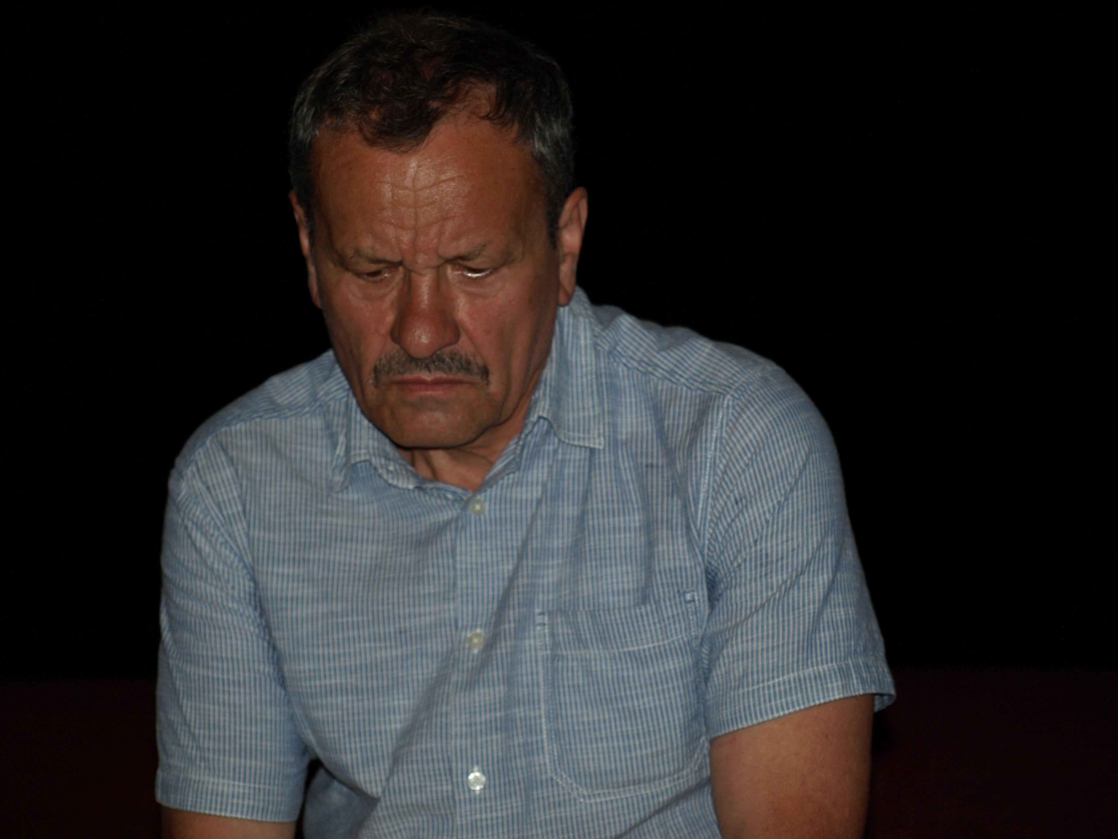 Díra u Hanušovic - novinářská konference - Autor Blanka Borová pro & 10Mpix.cz